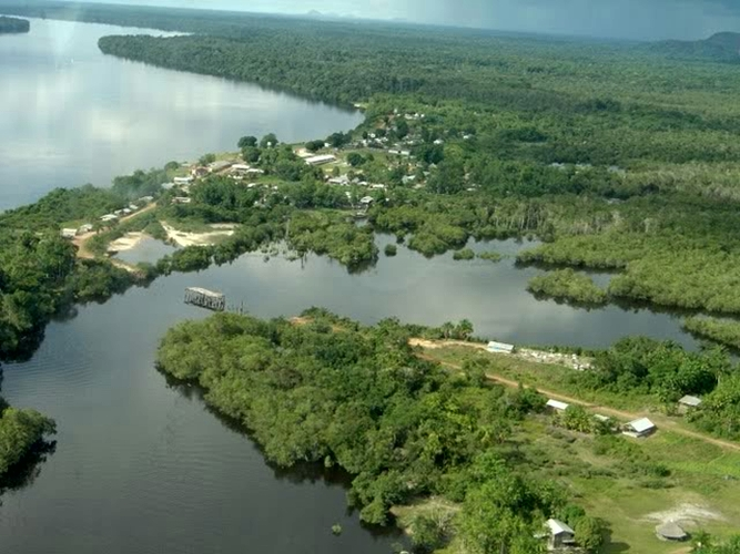 Cucuí - AM